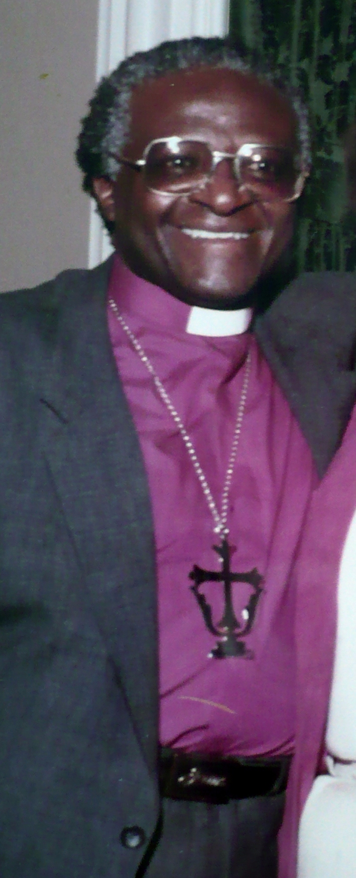 Fotografía del obispo sudafricano Desmond Tutu tomada en enero de 1986 durante una visita a California